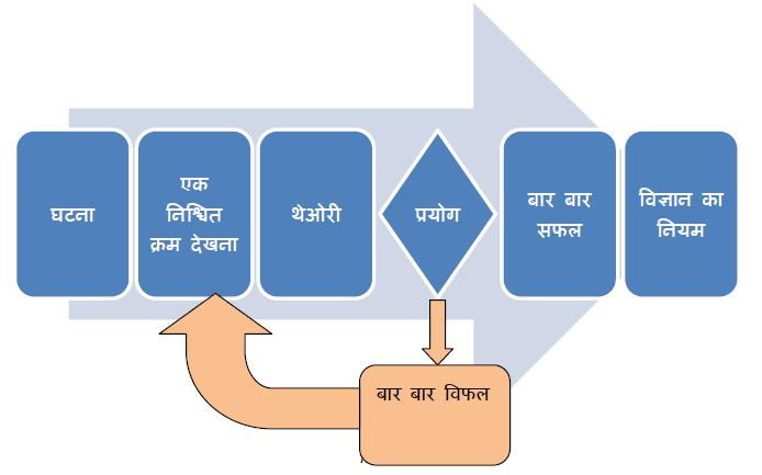 विज्ञान में विधि